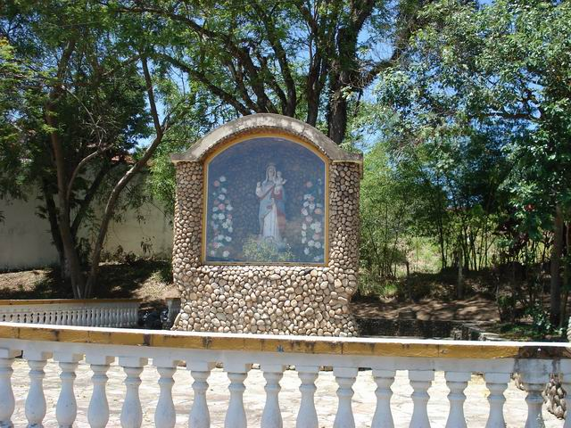 Bica da Gloria, Tremembe/SP